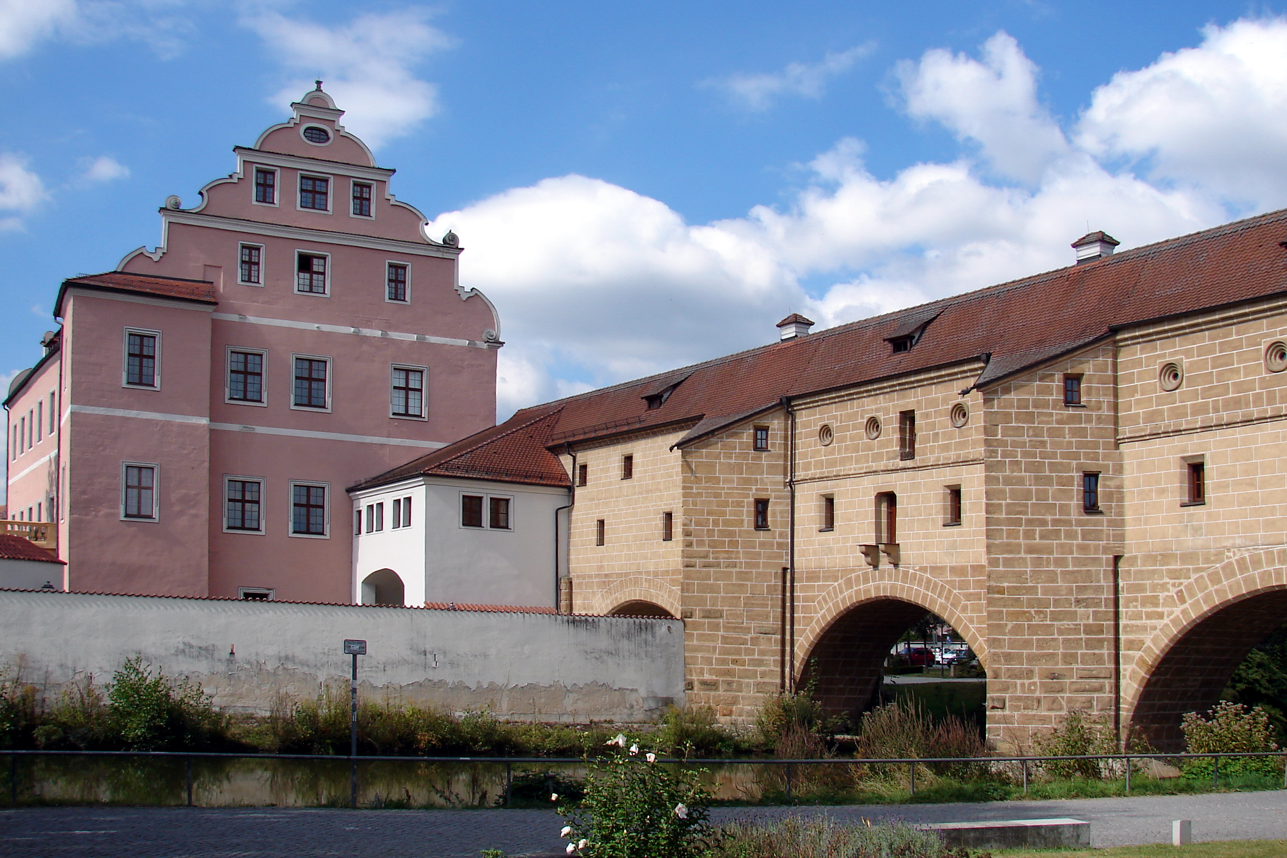 Der im Volksmund „Stadtbrille“ bezeichnete Wassertorbau.